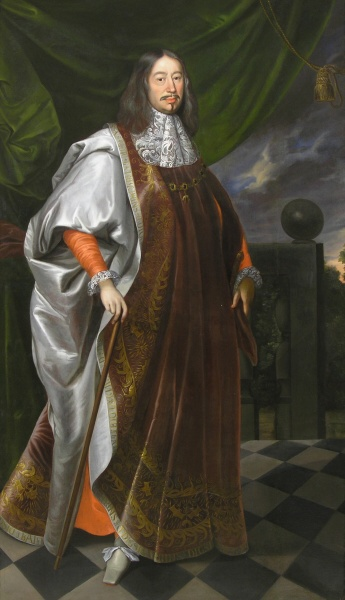 Jean-Adolphe de Schwarzenberg (1615-1683), premier prince de Schwarzenberg.